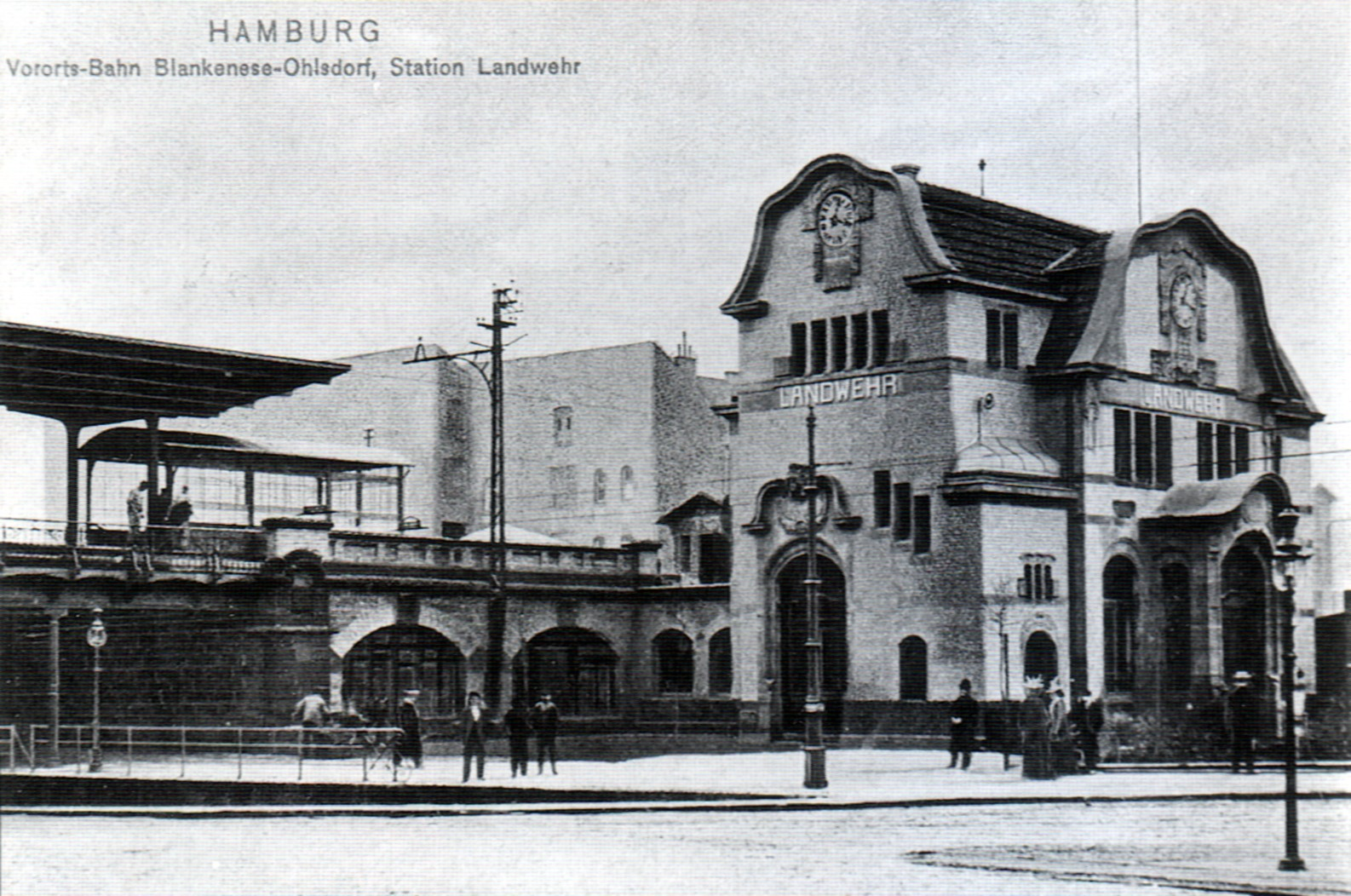 Bf. Landwehr in Hamburg, Eilbek